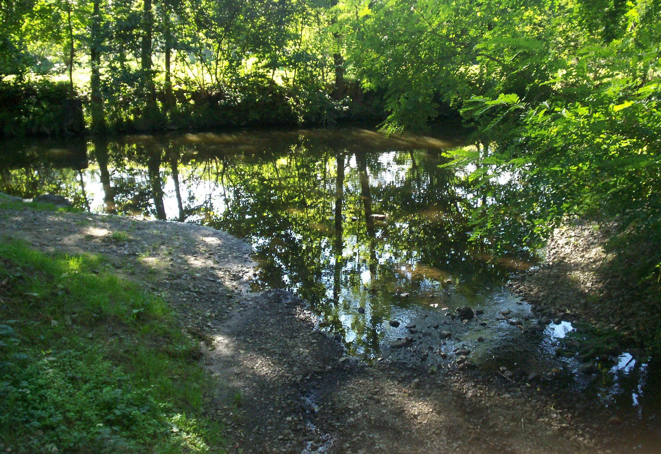 Ústí potoku Cecima do řeky Úslavy ve městě Blovice, fotografováno směrem od pěšiny směr Kamensko